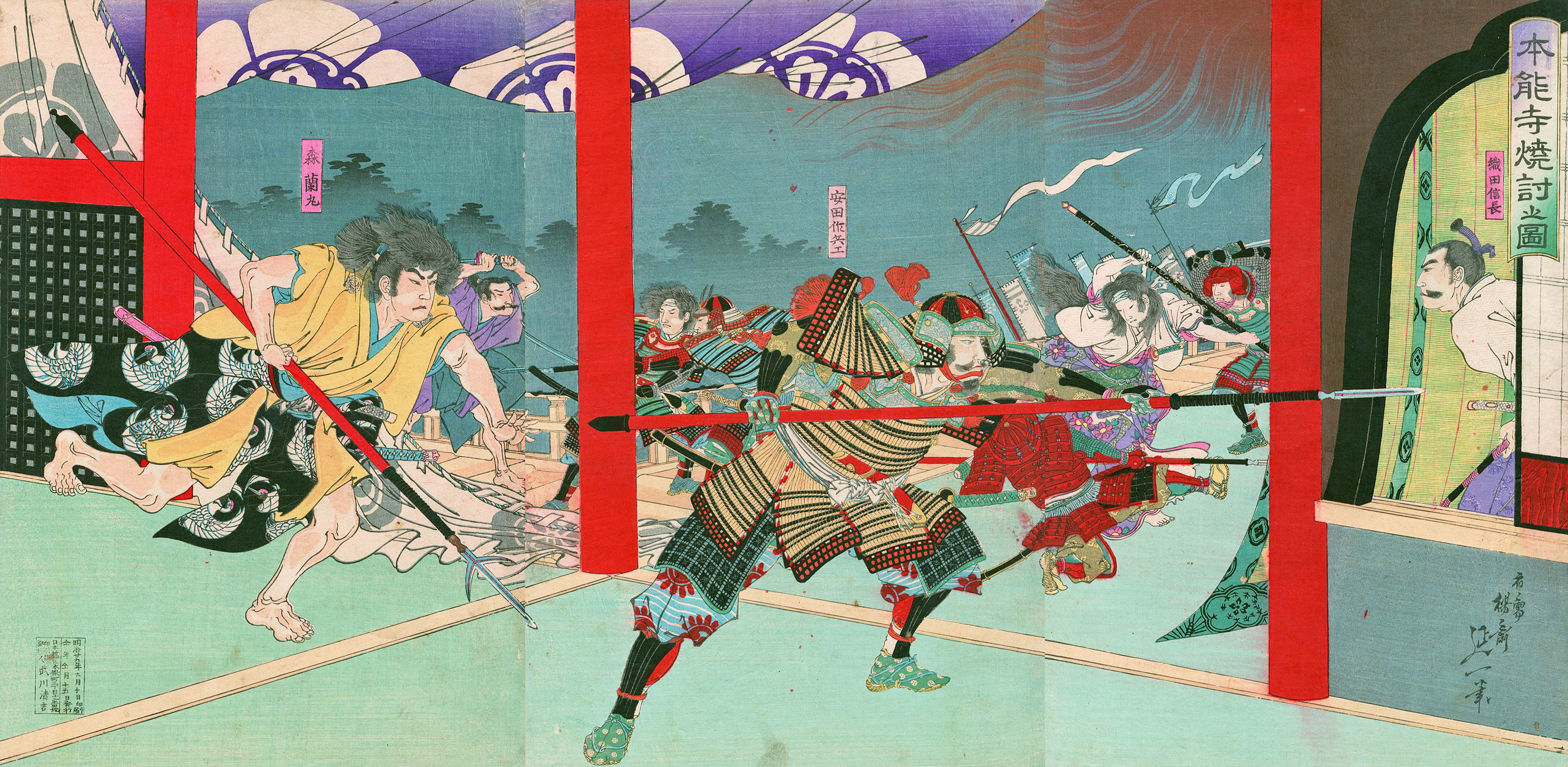 錦絵 本能寺焼討之図 3枚続 楊斎延一画 37.4×73.2 明治時代作成 名古屋市所蔵